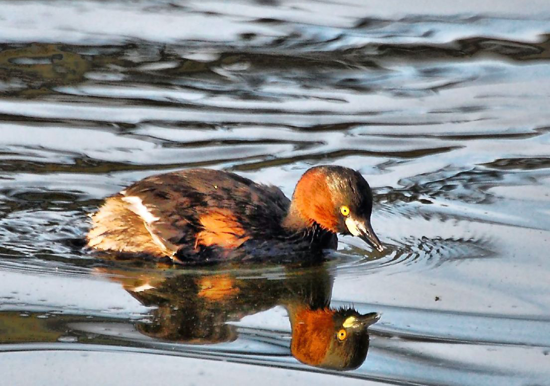 Kodaikanal, TamilNadu India